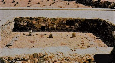 قبور عمات النبي ص صفية ع و عاتكة ع و جمانة ع و أم البنين و أسمها فاطمة بنت حزام